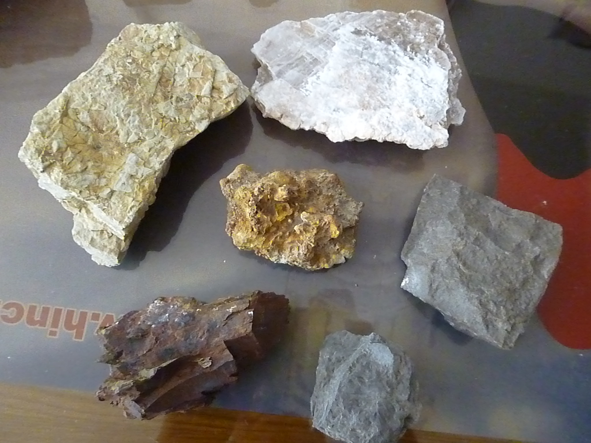 Conjunto de Rocas Sedimentarias (Arenisca, Yeso, Hierro de los Pantanos, Siltita y Lutitas)